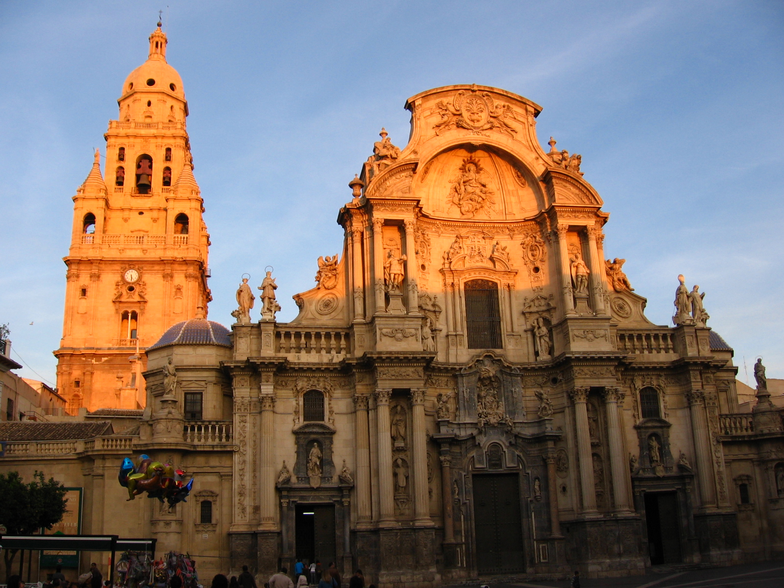 Catedral de Murcia. Fachada principal y torre